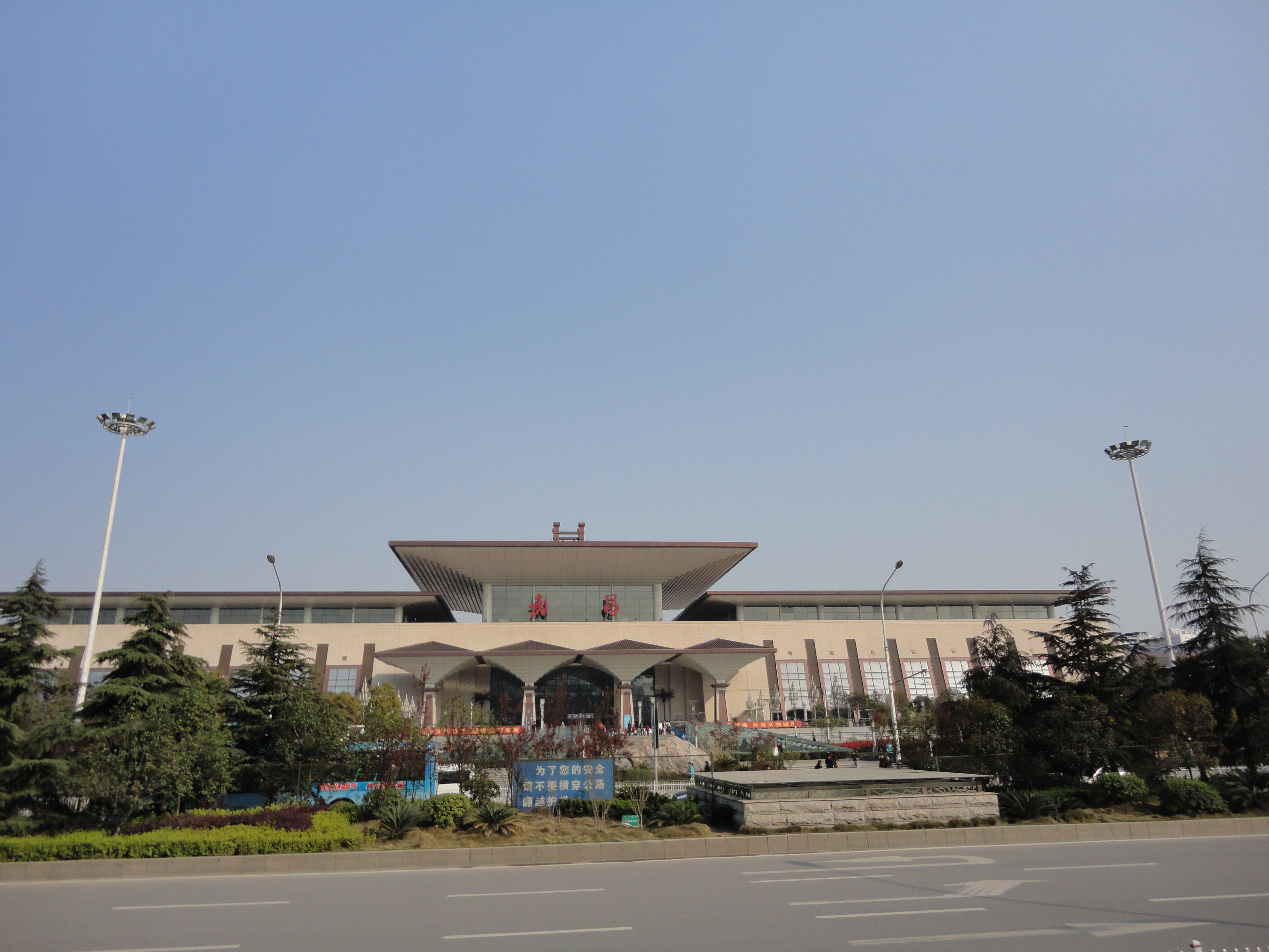 中文（中国大陆）: 武汉，武昌火车站